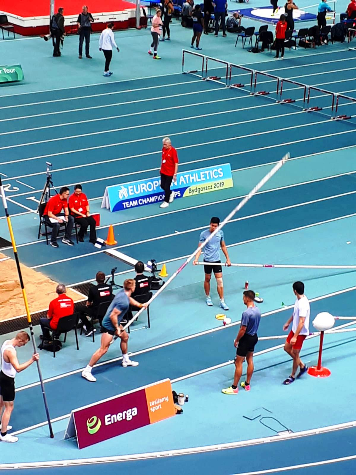 Copernicus Cup 2019 w Toruniu